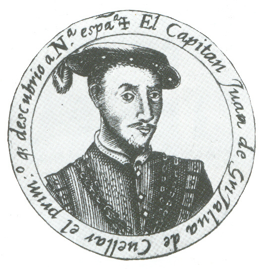 Retrato de Juan de Grijalva, natural de Cuéllar, conquistador español.